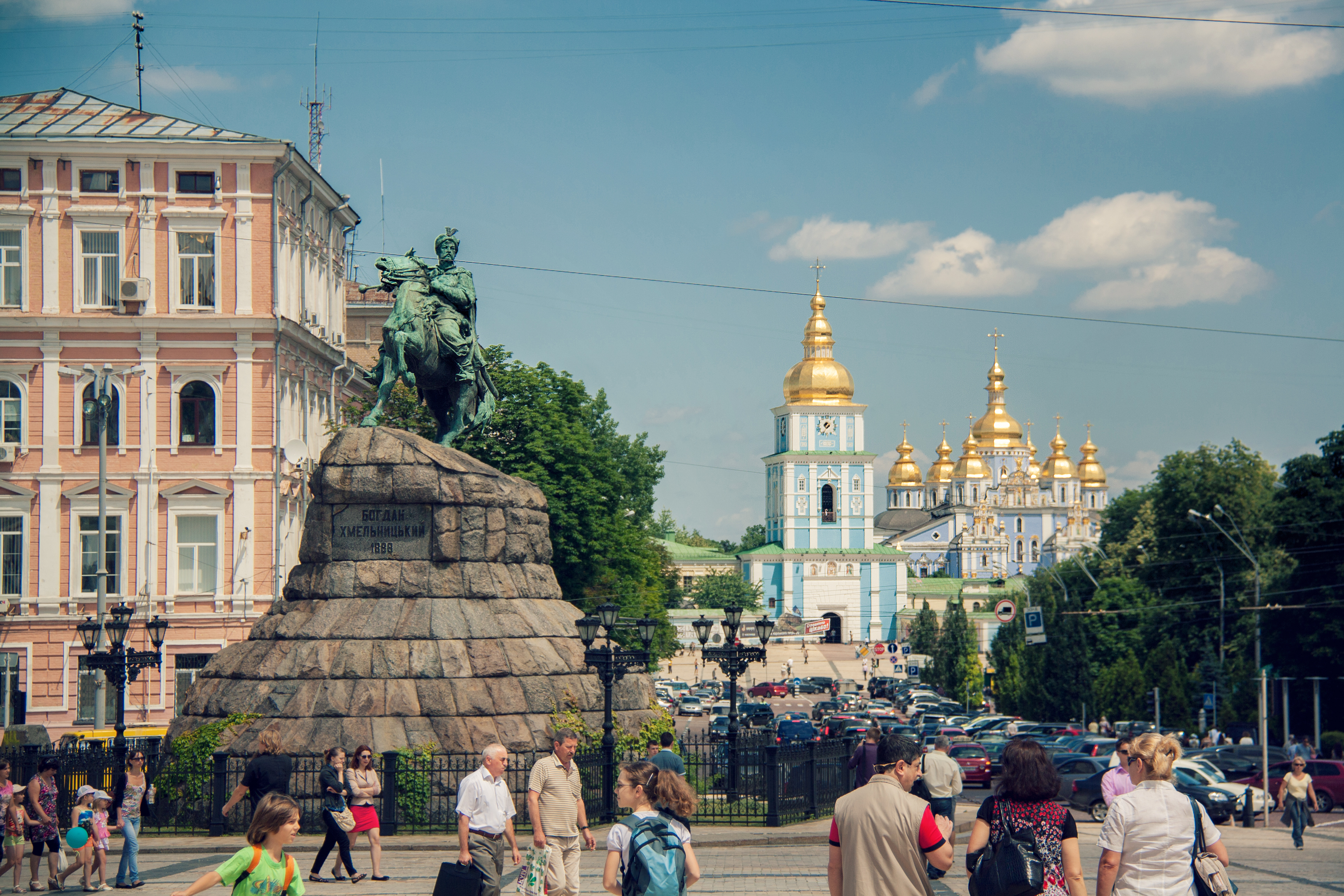 Ucrania